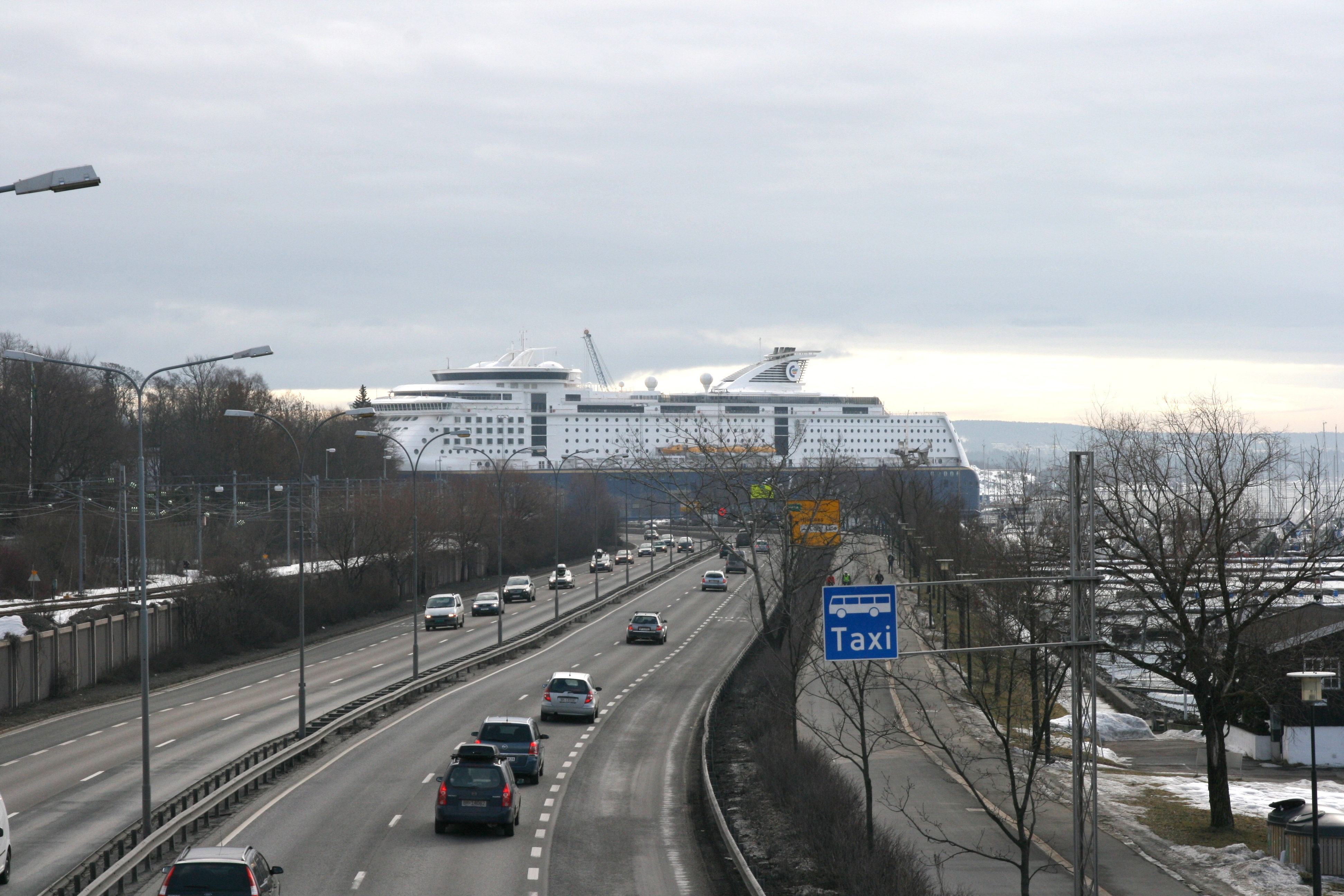 E18 på Skarpsno (Frognerstranda) i Oslo. I bakgrunnen et av Color Lines skip.